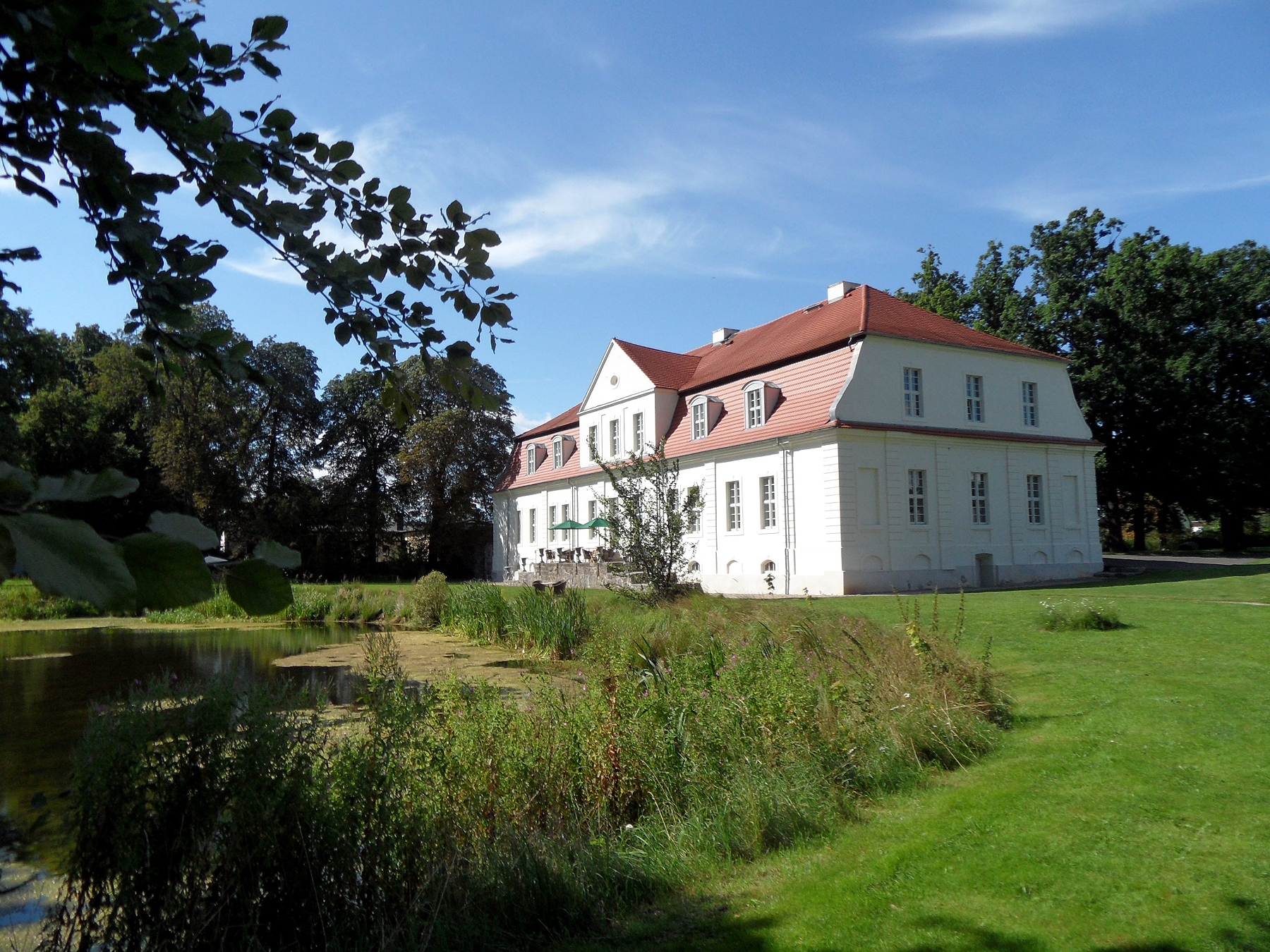 Herrenhaus Kotelow (rückwärtige Parkseite) in Galenbeck (Mecklenburg-Vorpommern) Datum: 11.08.2012 Urheber: onnola (Flickr-User) Quelle